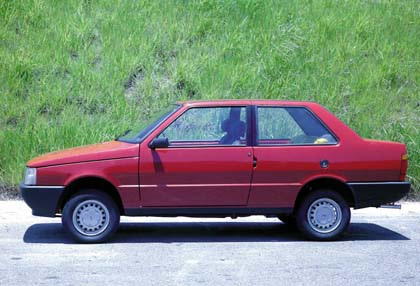 Fiat Prêmio - Duna 2 puertas.